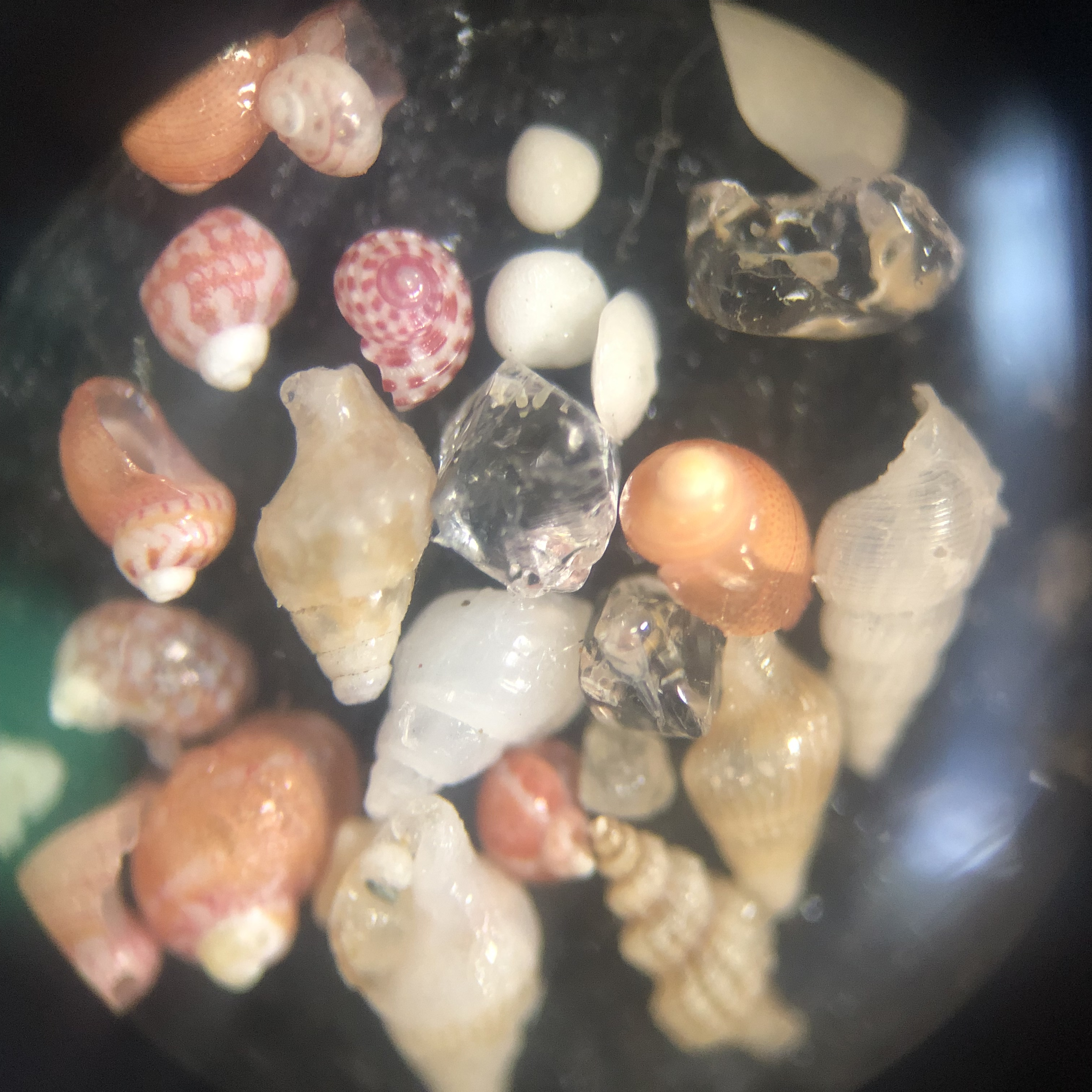 京都府京丹後市の琴引浜で拾った微笑貝の貝殻で大きさは２㎜ほど